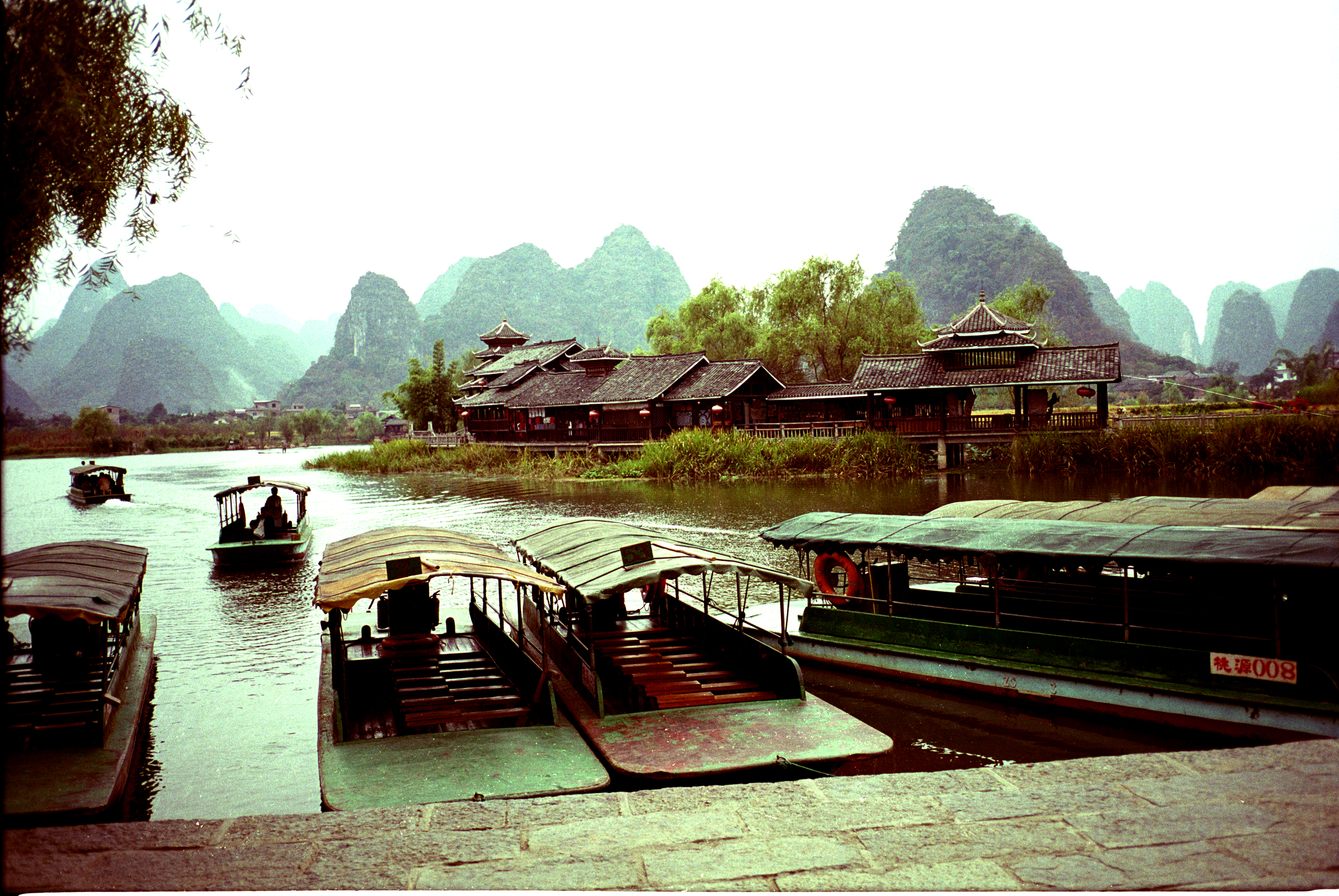 Shangrila in Yangshuo阳朔世外桃源